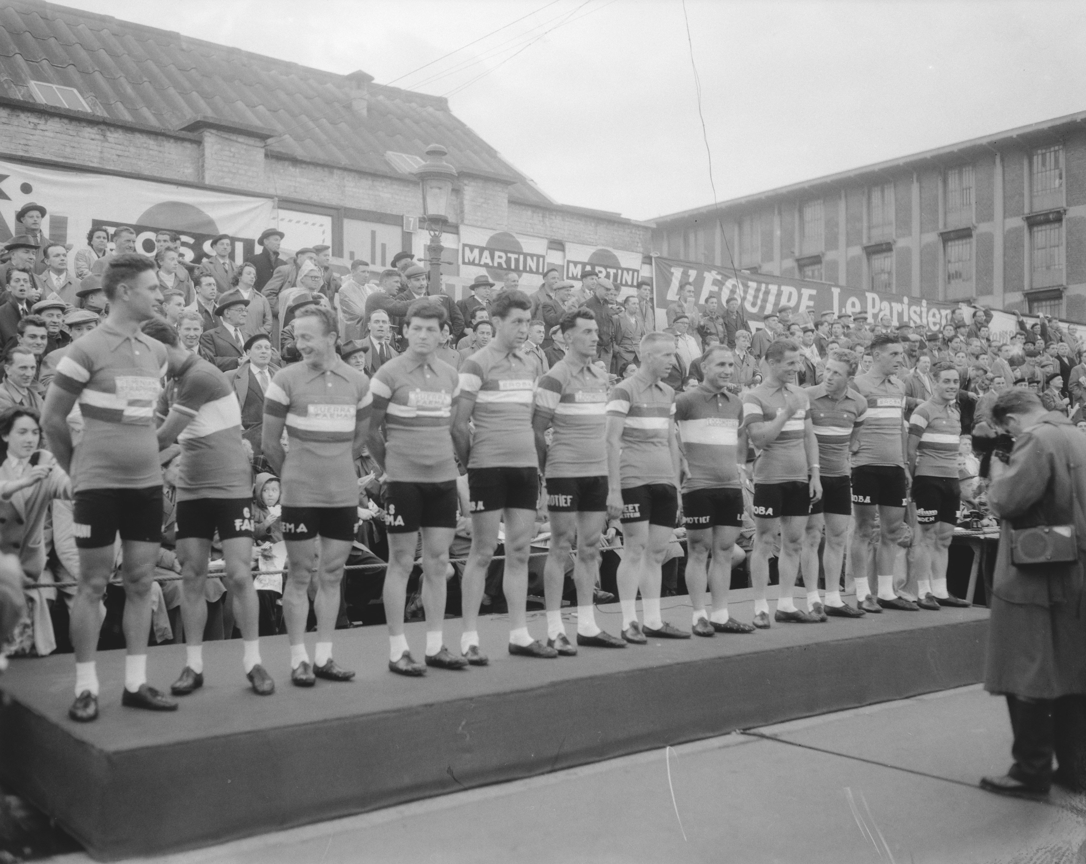 Collectie / Archief : Fotocollectie Anefo Reportage / Serie : [ onbekend ] Beschrijving : Tour de France ploeg stelt zich voor in Brussel Datum : 24 juni 1958 Locatie : Brussel Trefwoorden : ploegen, sport, wielrennen Persoonsnaam : Bolzan, Damen, Ernzer, Est van, Gaul, Jongh De, Kersten, Lahaye, Sjef Fotograaf : Pot, Harry / Anefo Auteursrechthebbende : Nationaal Archief Materiaalsoort : Negatief (zwart/wit) Nummer archiefinventaris : bekijk toegang 2.24.01.04 Bestanddeelnummer : 909-6598